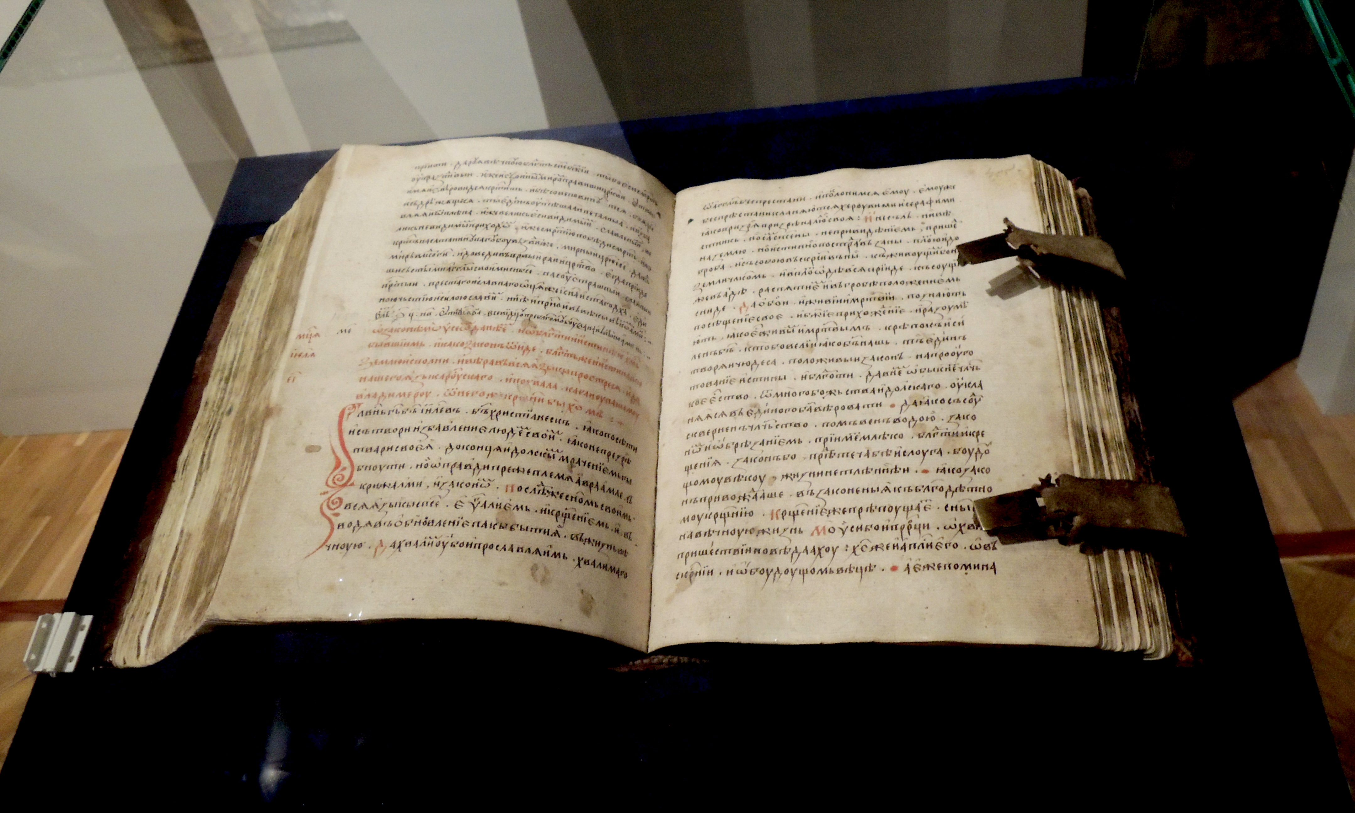 Торжественник со "Словом о Законе и Благодати" митрополита Иллариона. 1-я пол. 15 века. Рукопись: бумага, чернила, киноварь, полуустав. Переплет: доски, кожа с тиснением. Древнейшее из оригинальных литературных произведений Древней Руси. Написано между 1037-50 гг. ГИМ